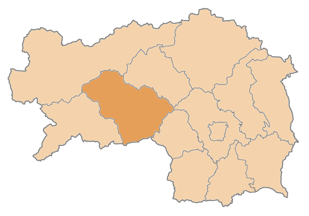 Karte: politischer Bezirk Murtal